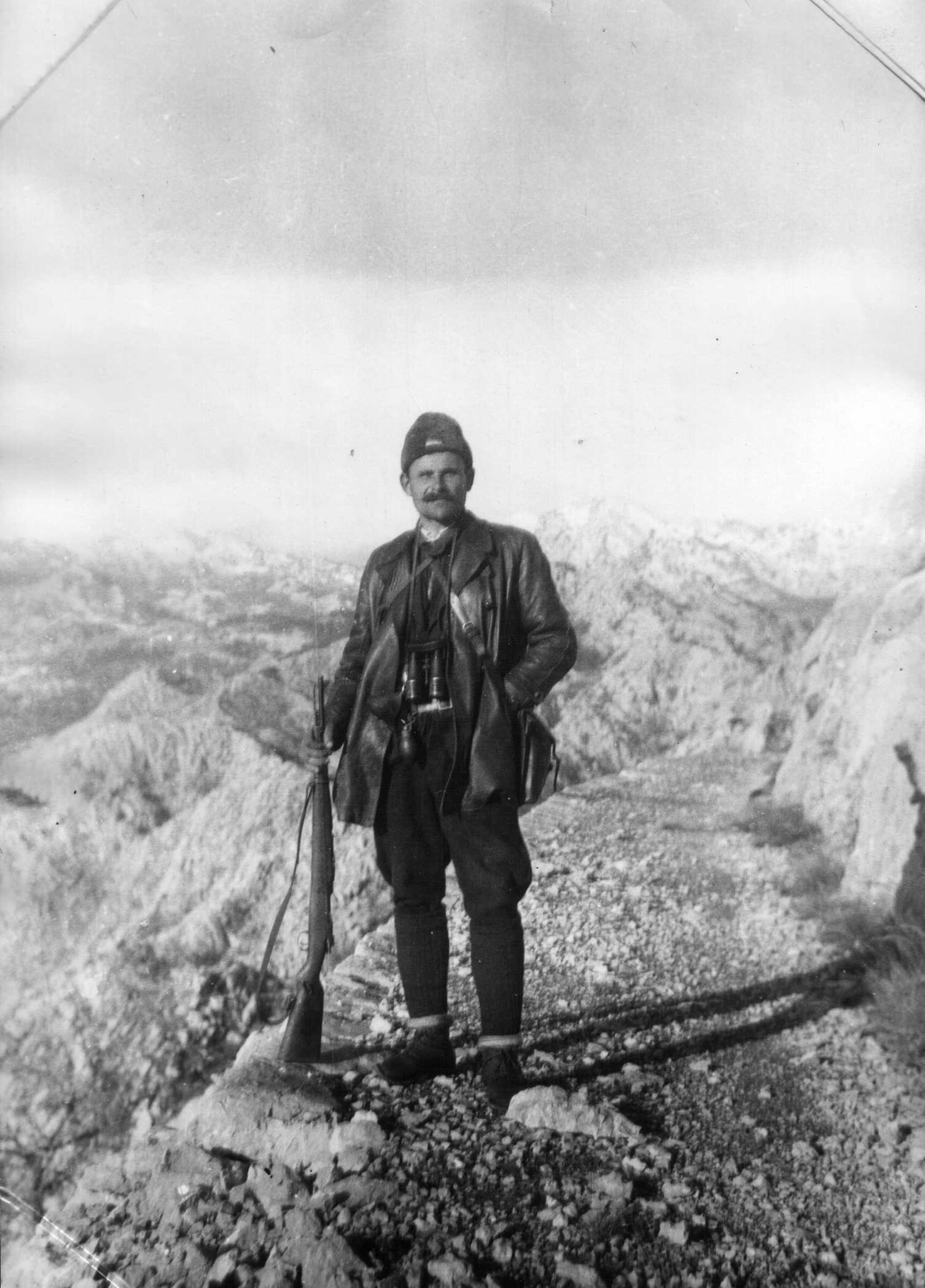 Srpskohrvatski / српскохрватски: Narodni heroj Sava Kovačević